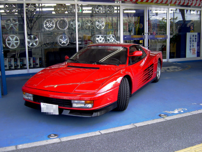 Ferrari-TESTAROSSA(フェラーリ),Hiroshima Japan